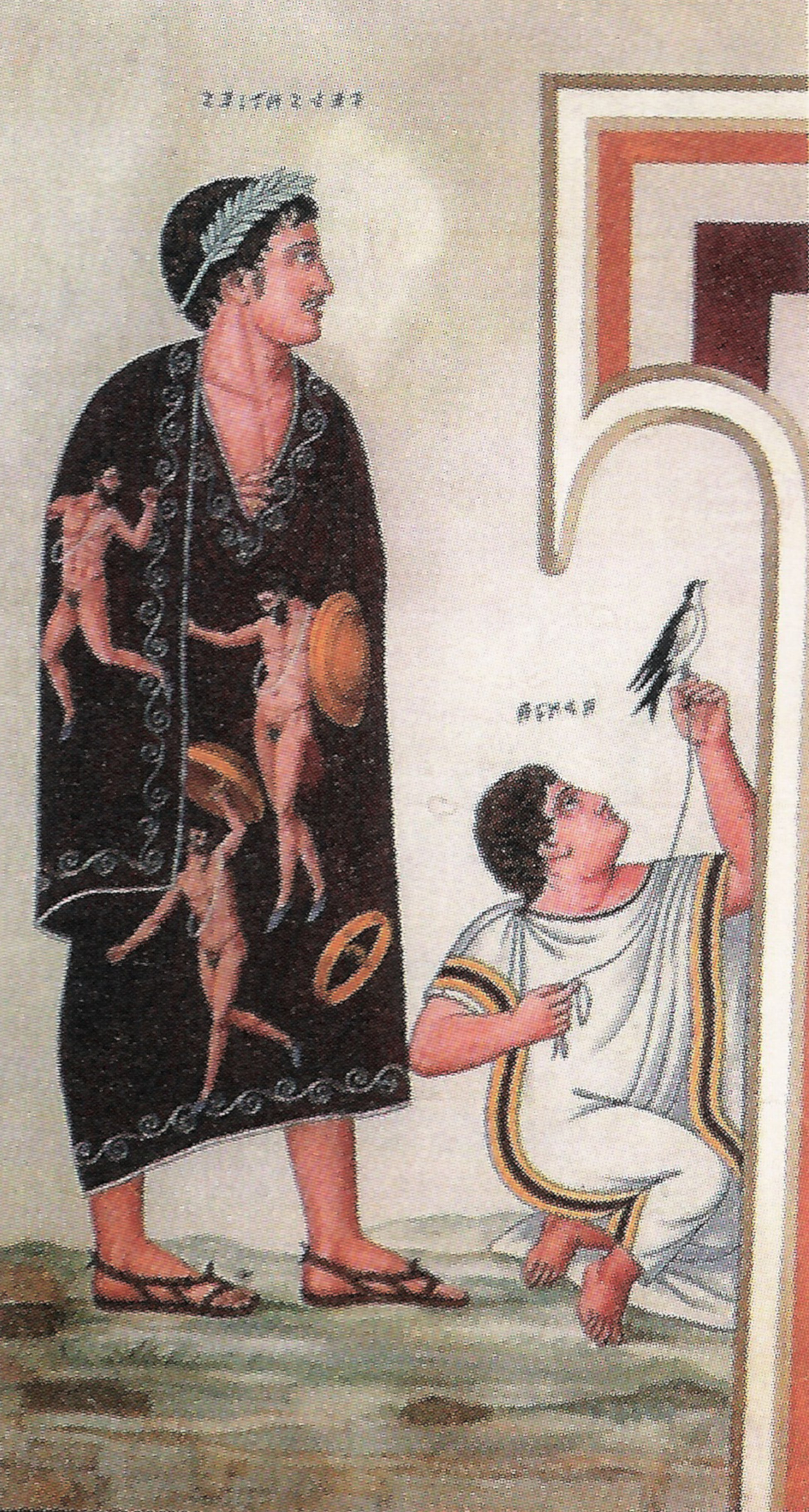 Vel Saties et Arnza - Reproduction de fresque de la Tombe François par Carlo Ruspi (XIXe siècle) sur le site